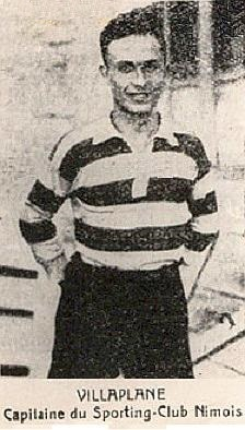 Alex Villaplane